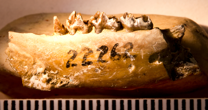 Pelycodus praetutus Gazin, 1962